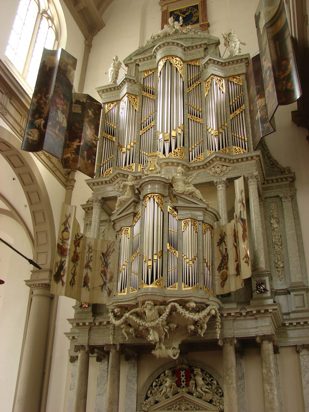 Main organ (Duyschot, 1686), Westerkerk, Amsterdam